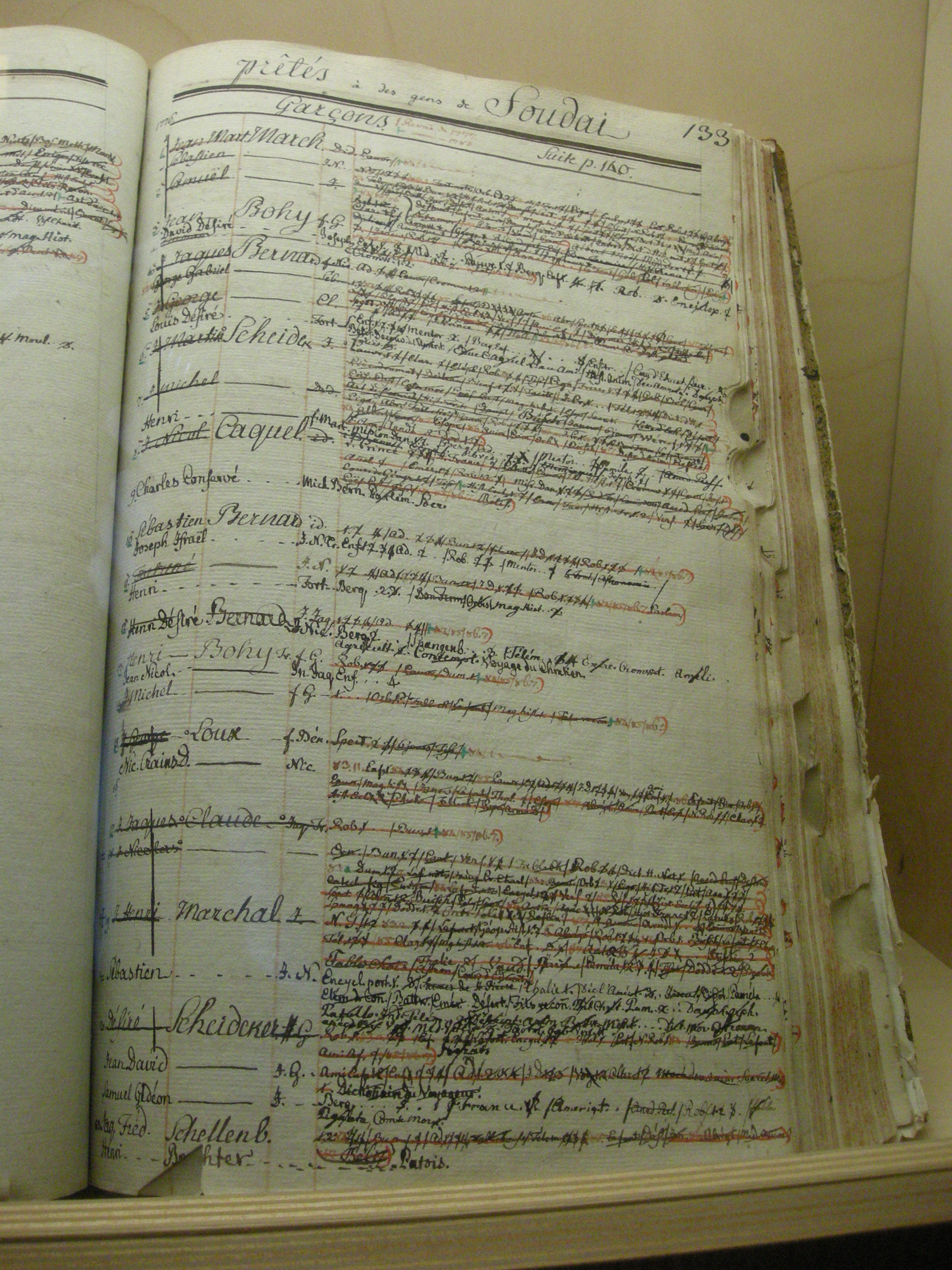 Registre de la bibliothèque de prêt créée au Ban de la Roche vers 1762 par J. G. Stouber et gérée par son successeur le pasteur Oberlin - Musée Jean-Frédéric Oberlin à Waldersbach (67)